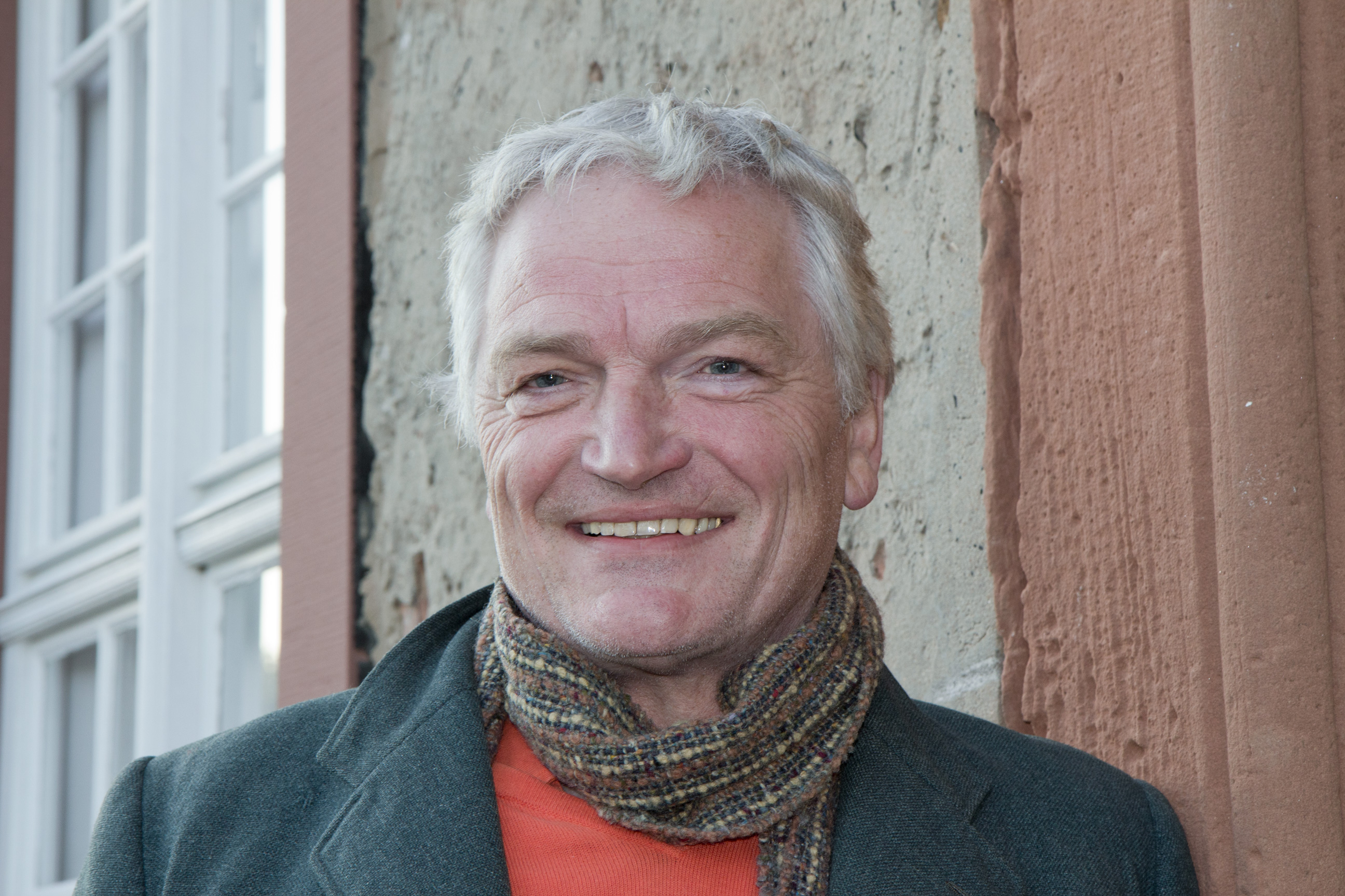 Axel Gallun (* 22. Mai 1952 in Büdingen) ist ein freischaffender Maler, Bildhauer und Grafiker.